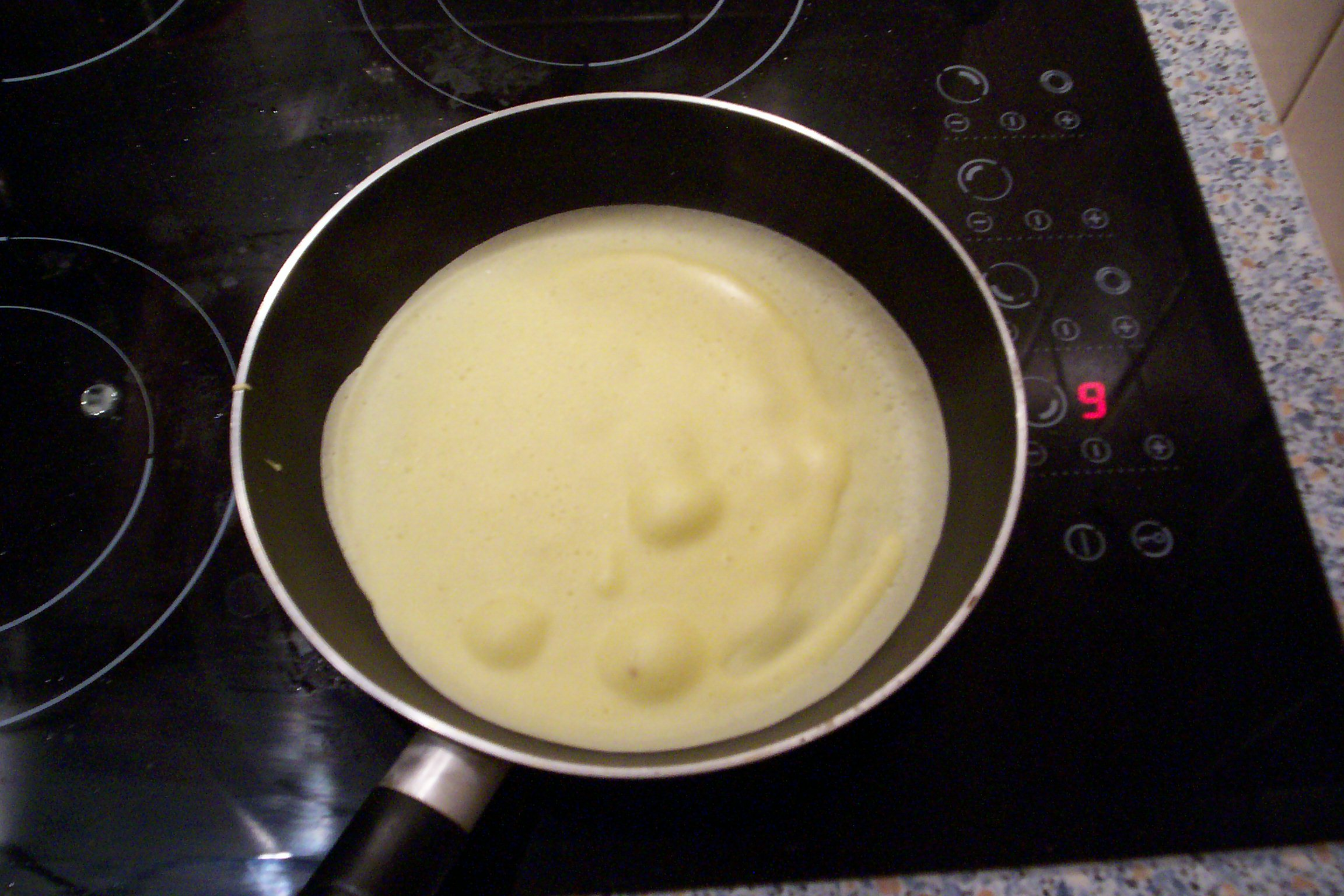 Ciasto naleśnikowe podczas smażenia na patelni